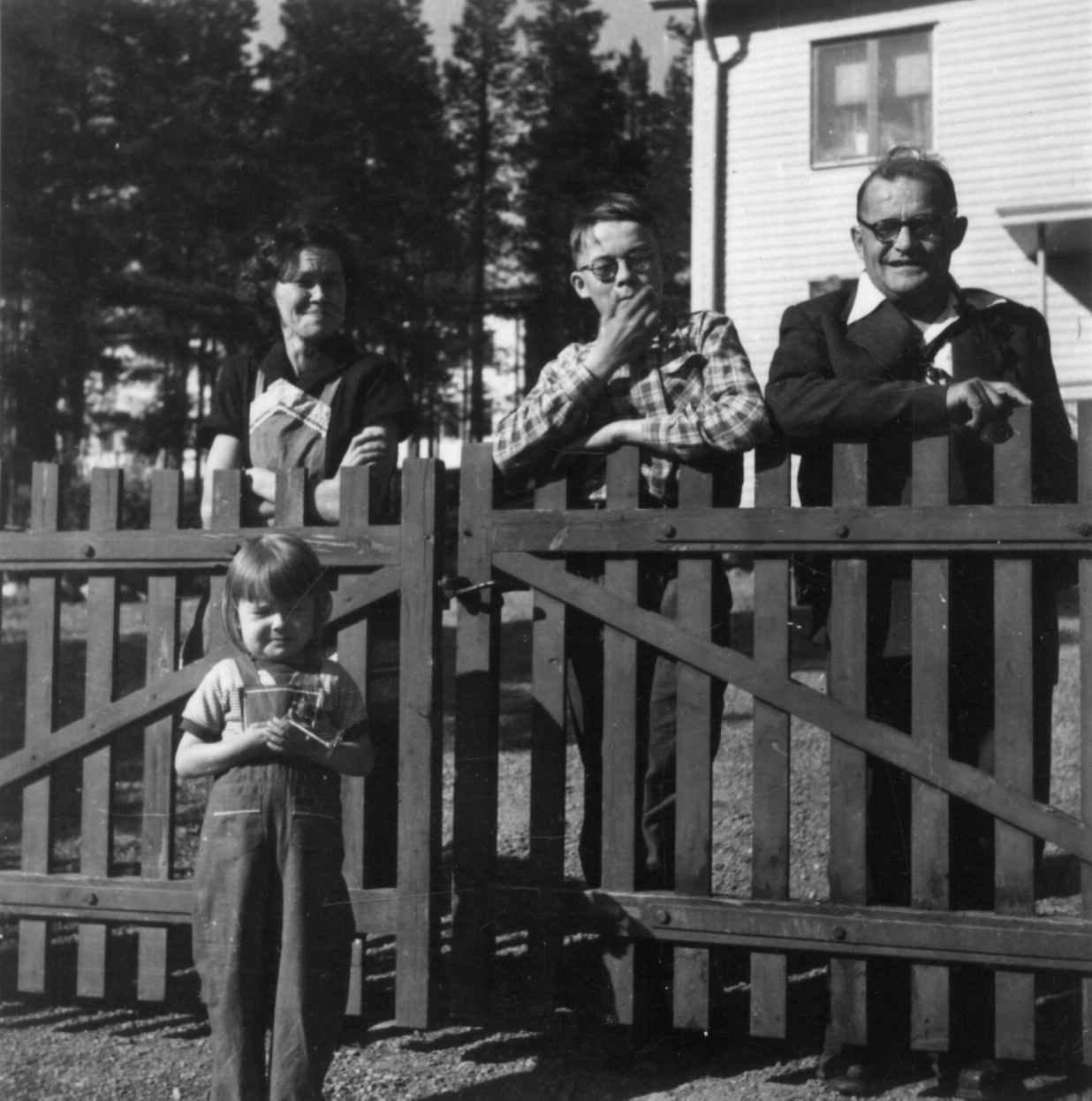 Portrett av nomadeskolelærer Carl Johansson med familie utenfor huset, 1954.